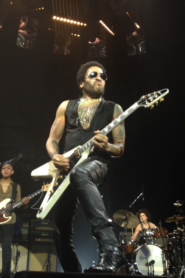 Lenny Kravitz en concert à Nice (Palais Nikaïa), le 30 novembre 2014.